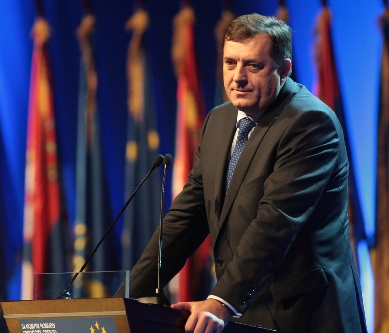 BEOGRAD, 18.12.2010. - XIV Izborna skupstina Demokratske stranke u Sava Centru. FOTO: Foto servis DS / KONTRAFOTO